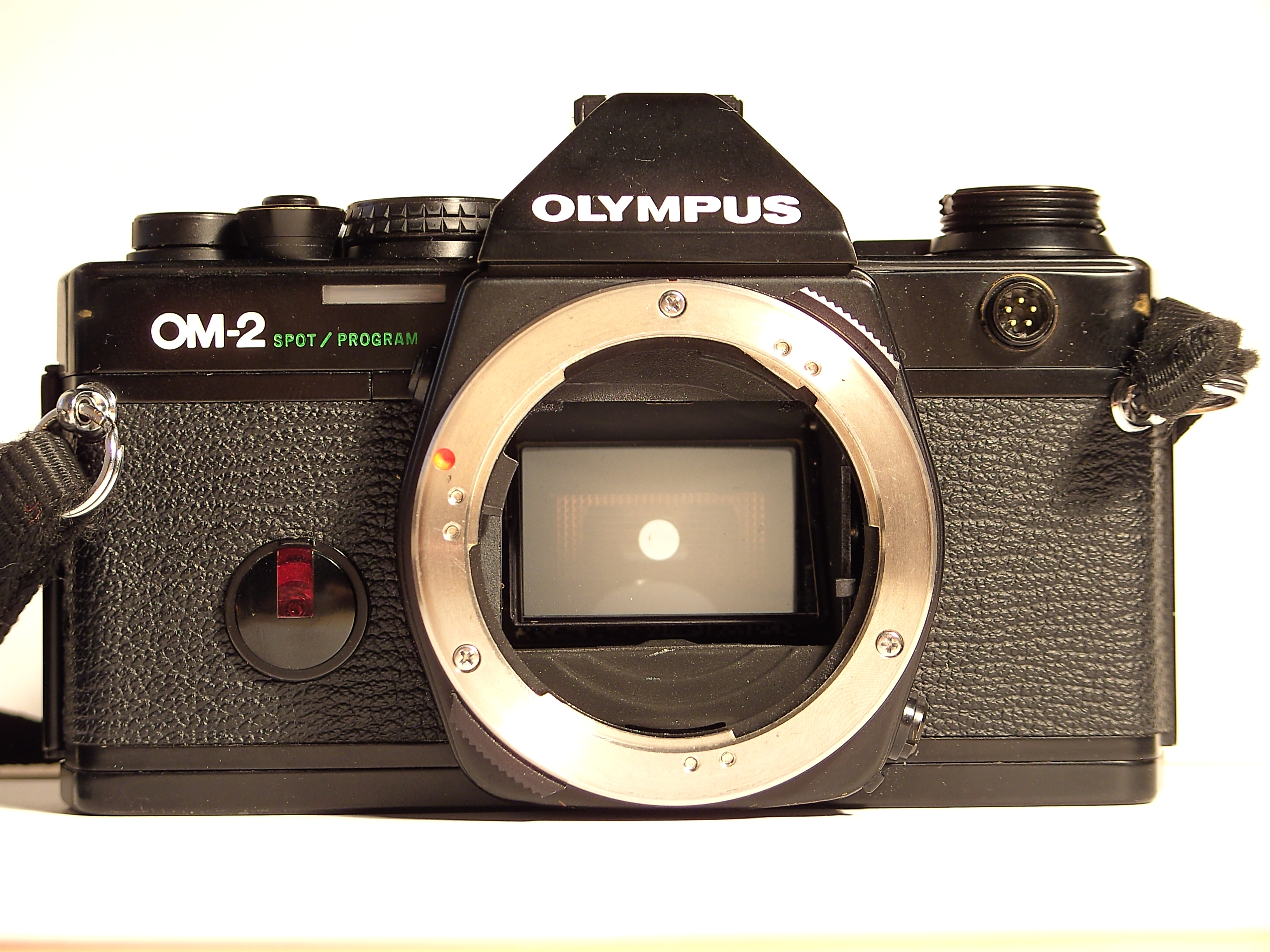 Olympus OM-2 SP in schwarz, ohne Objektiv